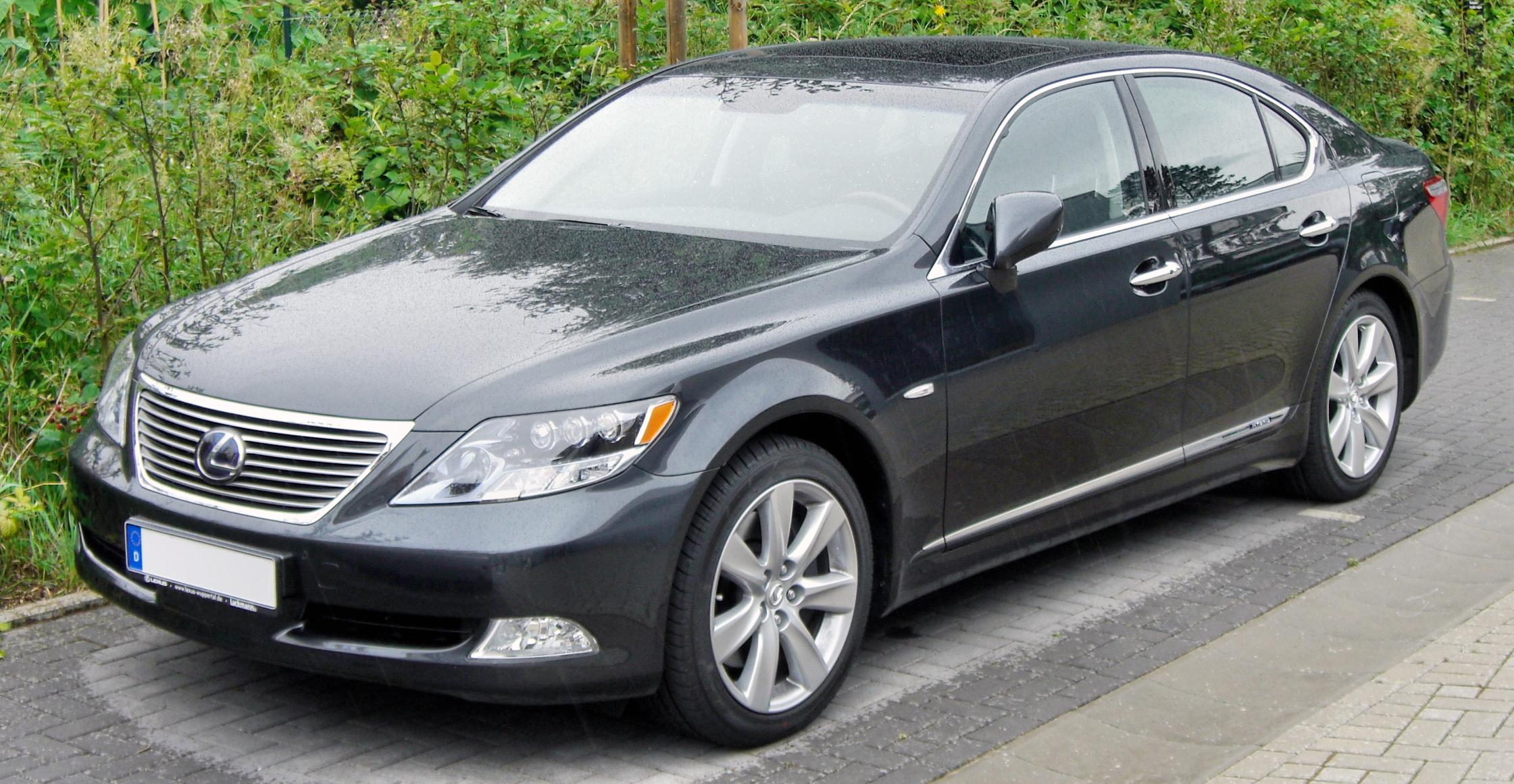 Lexus LS 600h